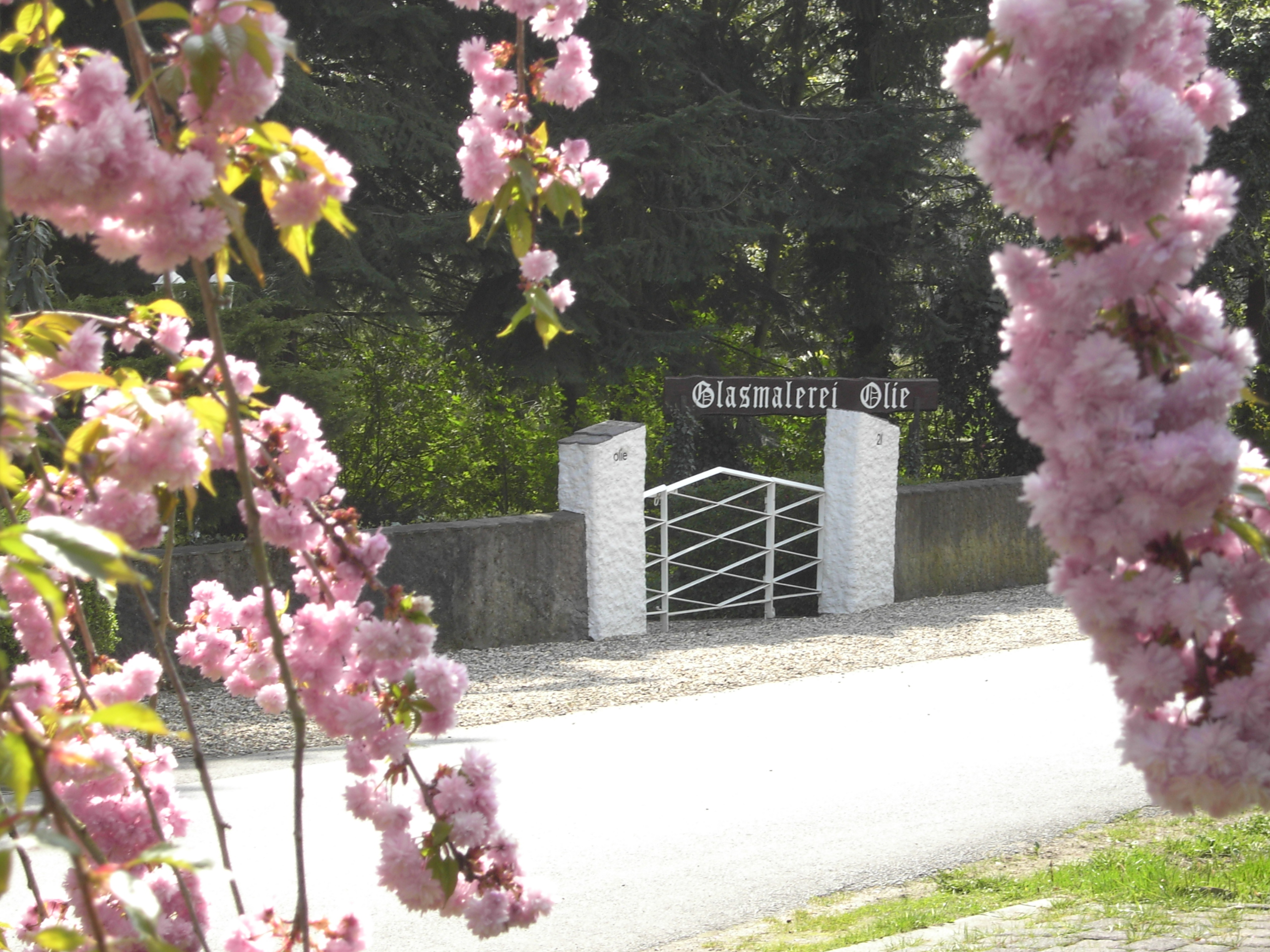 Eingang zum Atelier Glasmalerei Olie